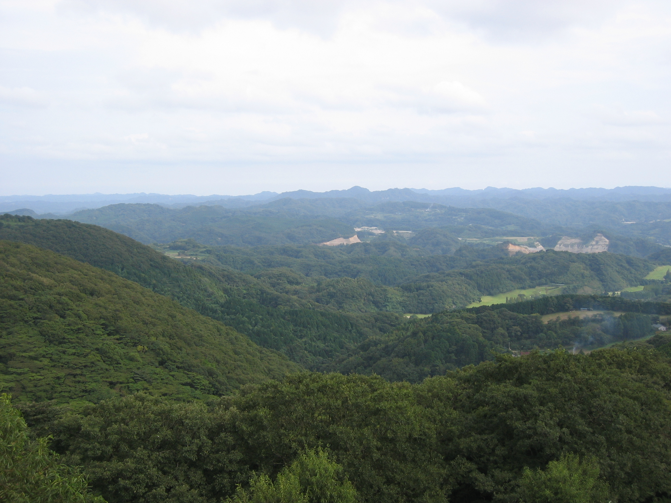 房総丘陵 千葉県富津市のマザー牧場にて